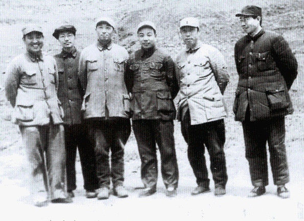 1946年中共西北领导人-林一山、刘澜波、肖华、张学思、白坚、江华